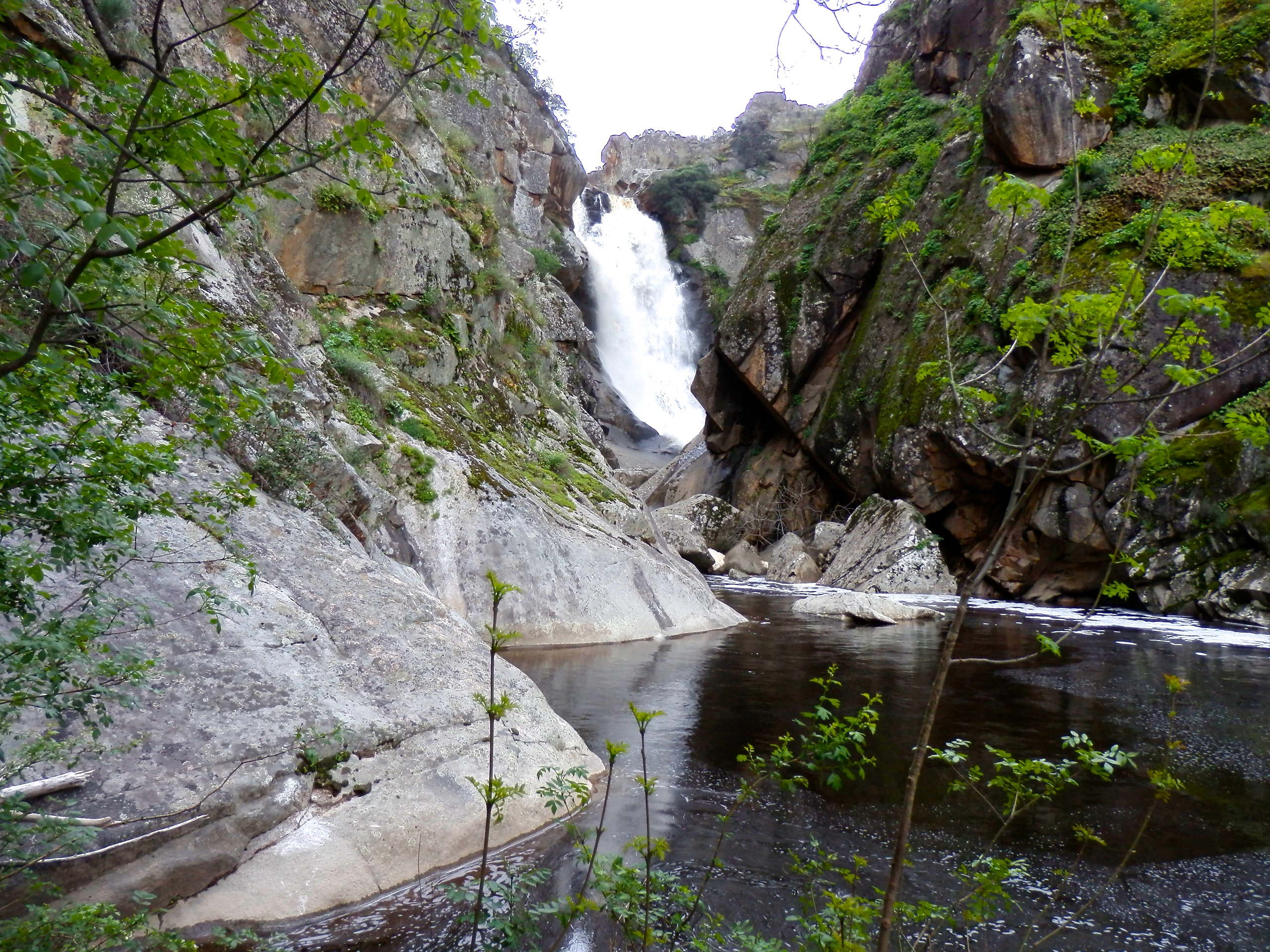 Cascada del Canchón